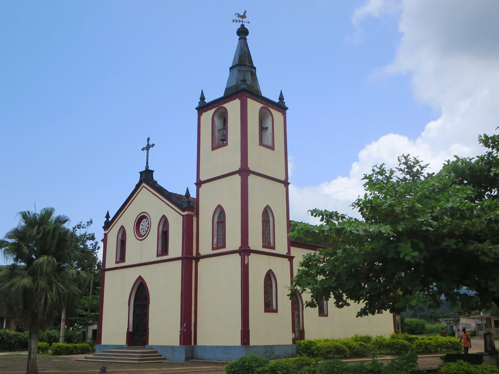 The Igreja Nossa Senhora da Conceicao in Santo Antonio on Principe Island, São Tomé and Príncipe, was restored in 1940.